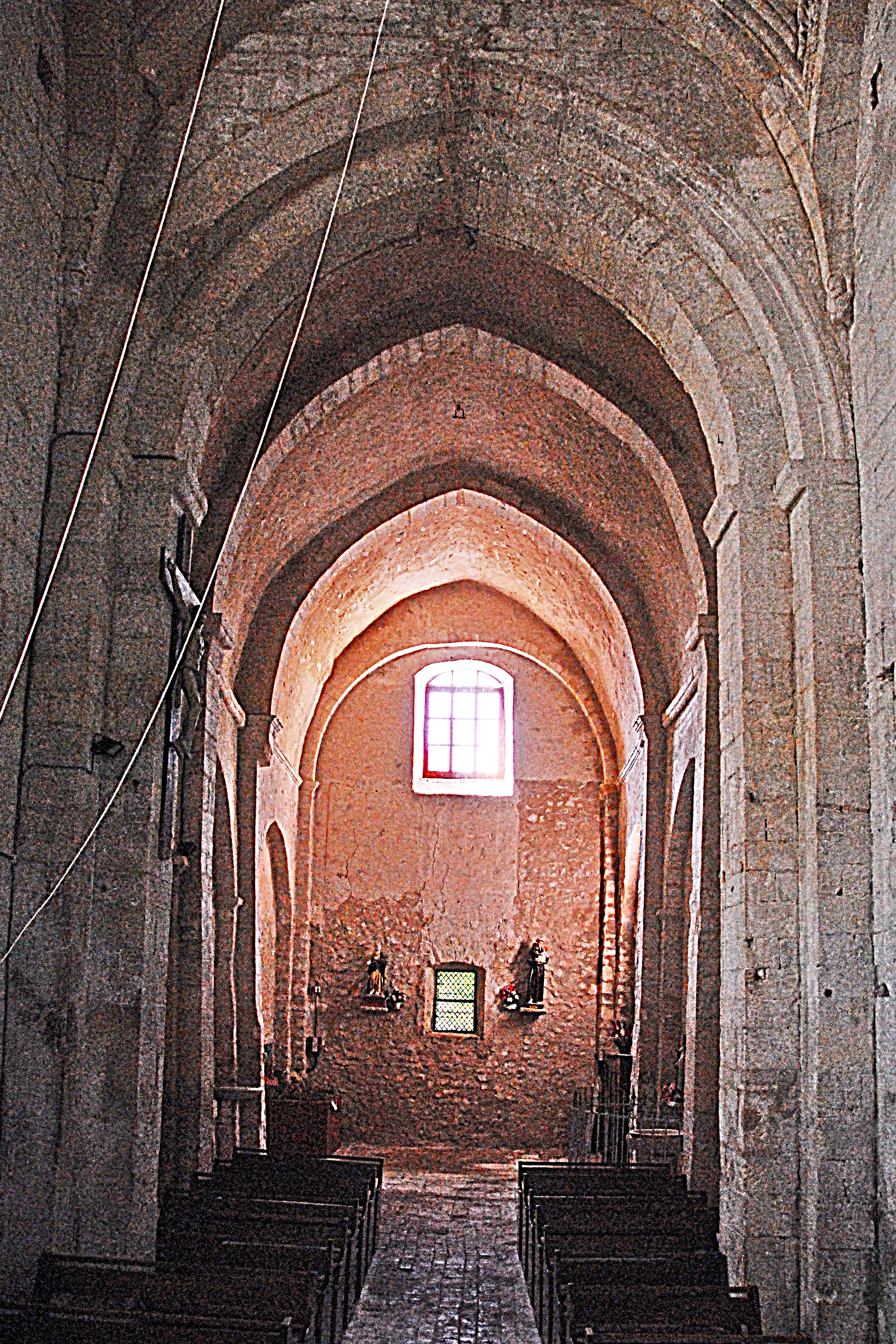 St-Trinit, Schiff aus Chor